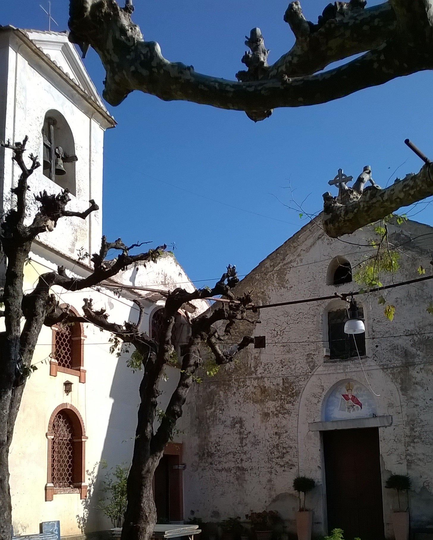 Chiesa dei Santi Gennaro e Giuliano a Villamena, Minori (SA)